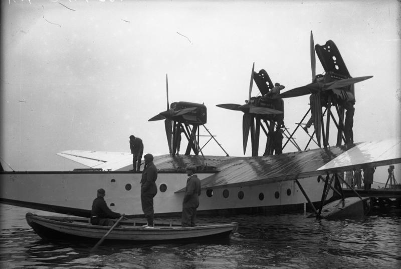 Der erste Start des Ozean. Riesenflugbootes Rohrbach in Travemünde ! Das Rohrbach-Riesen-Flugboot ist das grösste der Welt. Es wiegt 300 Ctr. Die Flügelspannweite beträgt 37 m, die Rumpflänge 22,70 m. Es ist mit 3 Motoren von insgesamt 2400 P.S. ausgestattet. Das ganze Boot besteht aus 8 wasserdichten Schoten wie sie die Ozeandampfer haben, welche bei Havarie völlig gegeneinander abgeschlossen und ein Untergehen des Flugbootes verhindern.